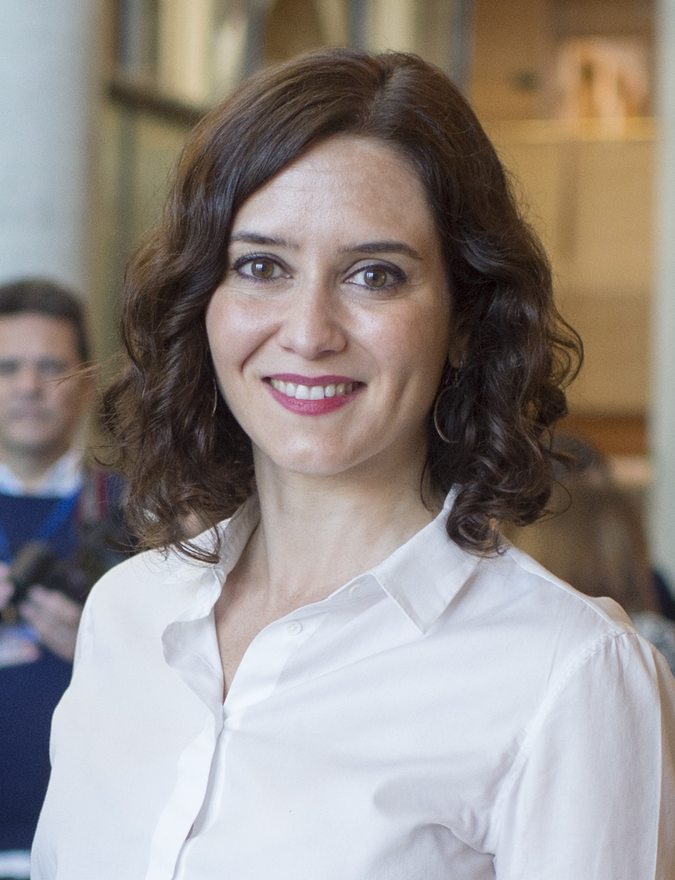 Reunión del Grupo Parlamentario Popular en la Asamblea de Madrid